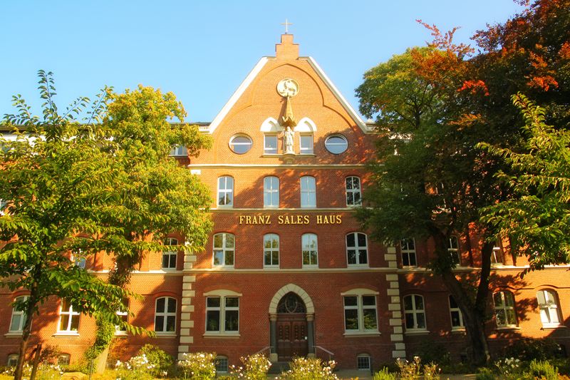 Außenansicht des Franz Sales Hauses in Essen. Zu sehen ist die historische Fassade, die bei der Modernisierung der Einrichtung erhalten blieb.